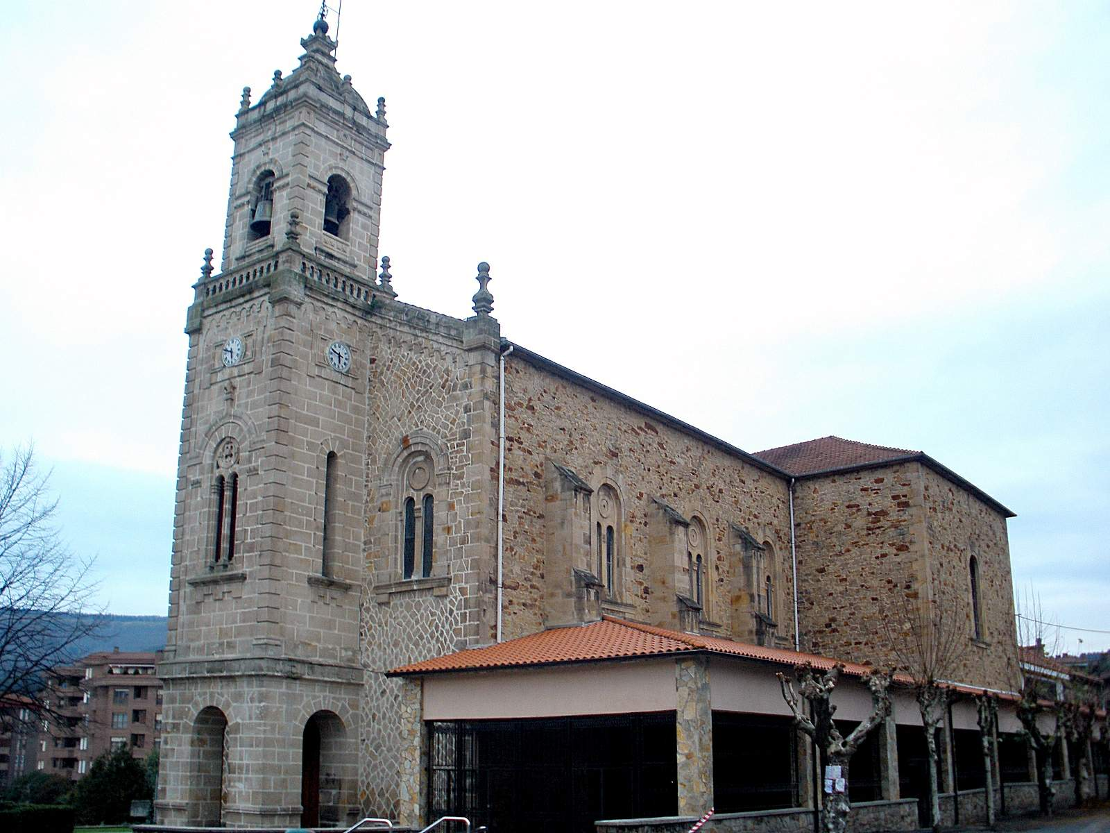 Iglesia de Santa María, Galdakao (Bizkaia)